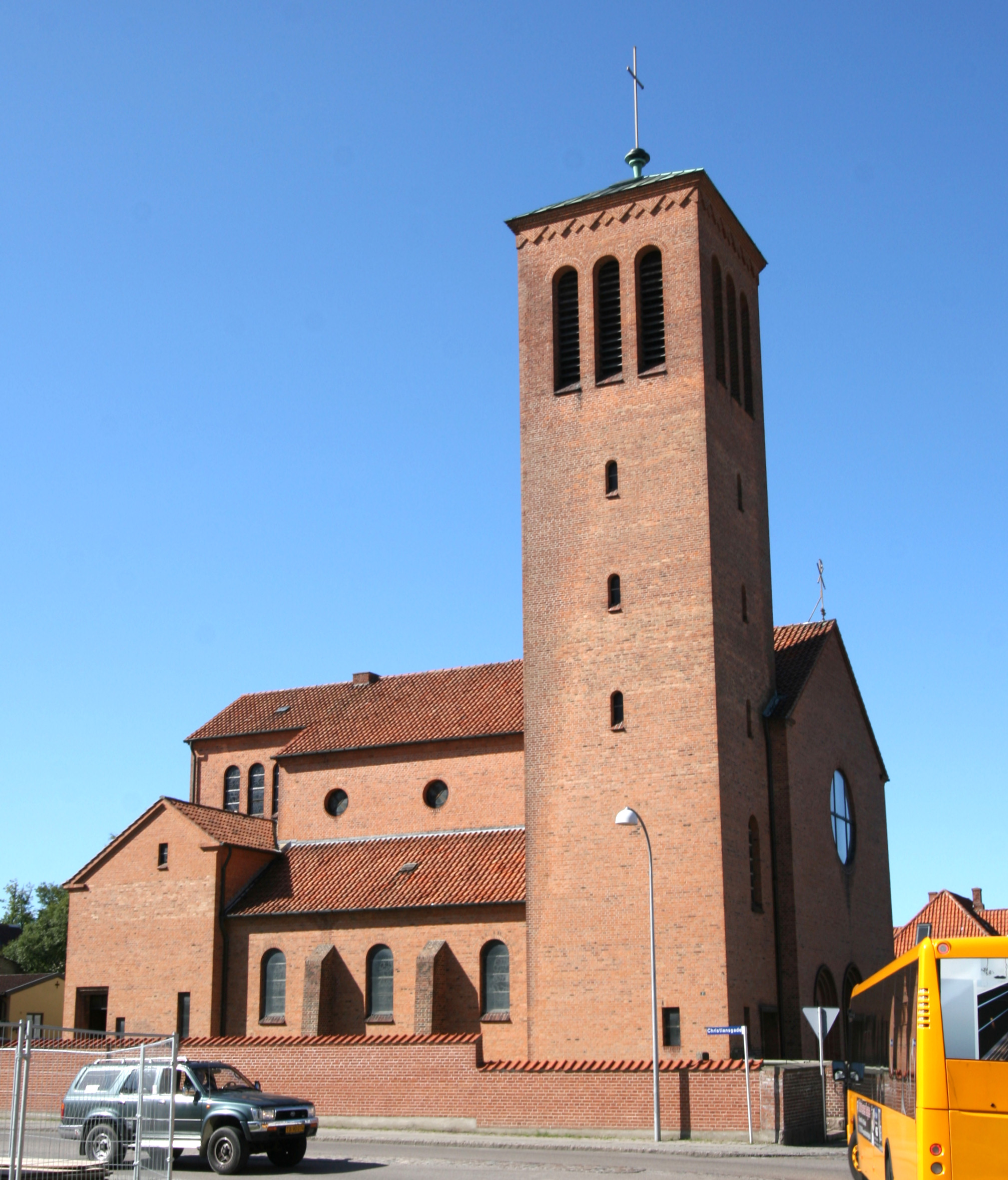 Vor Frue Kirke (Katolsk) Slagelse Kommune.